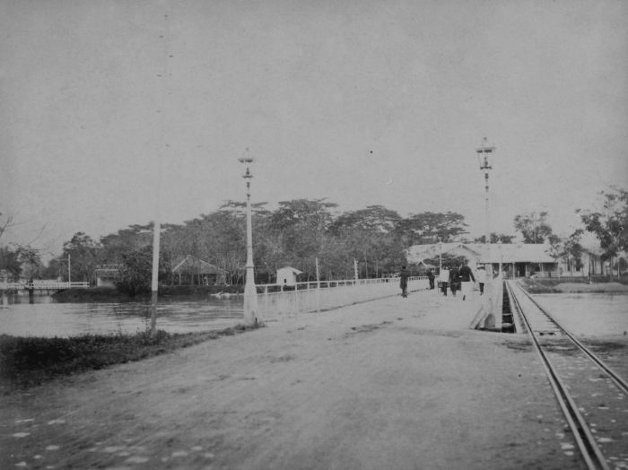 foto. De Demmenibrug over de Atjehrivier in Koetaradja